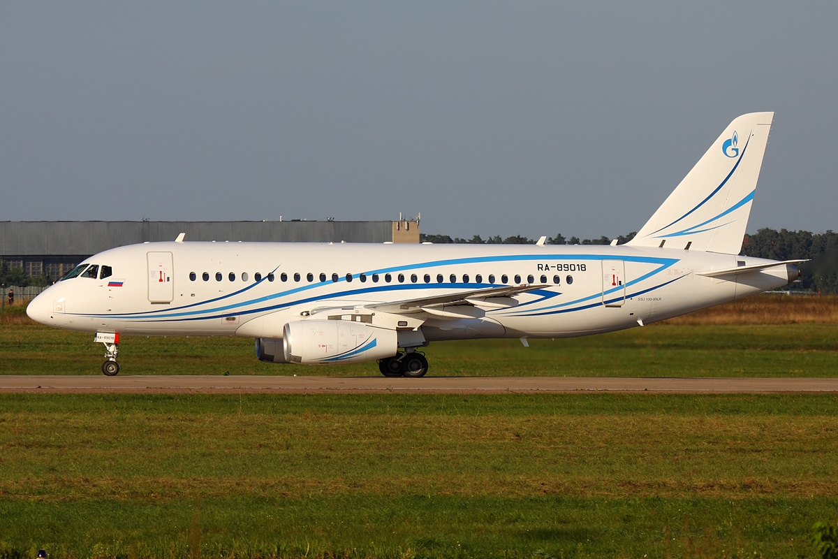 Sukhoi Superjet 100-95 (RA-89018)